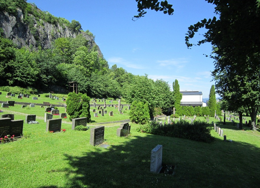 Bilet kapell og gravlund, Holmestrand